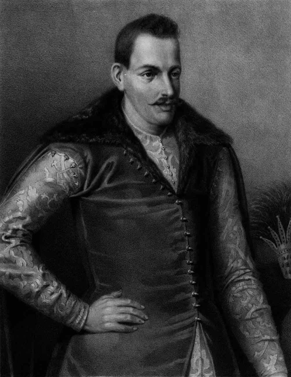 Беларуская (тарашкевіца): Партрэт Рамана Сангушкі (Raman Sanguška).